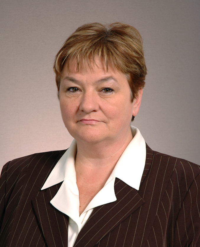 Senator Elżbieta Gelert